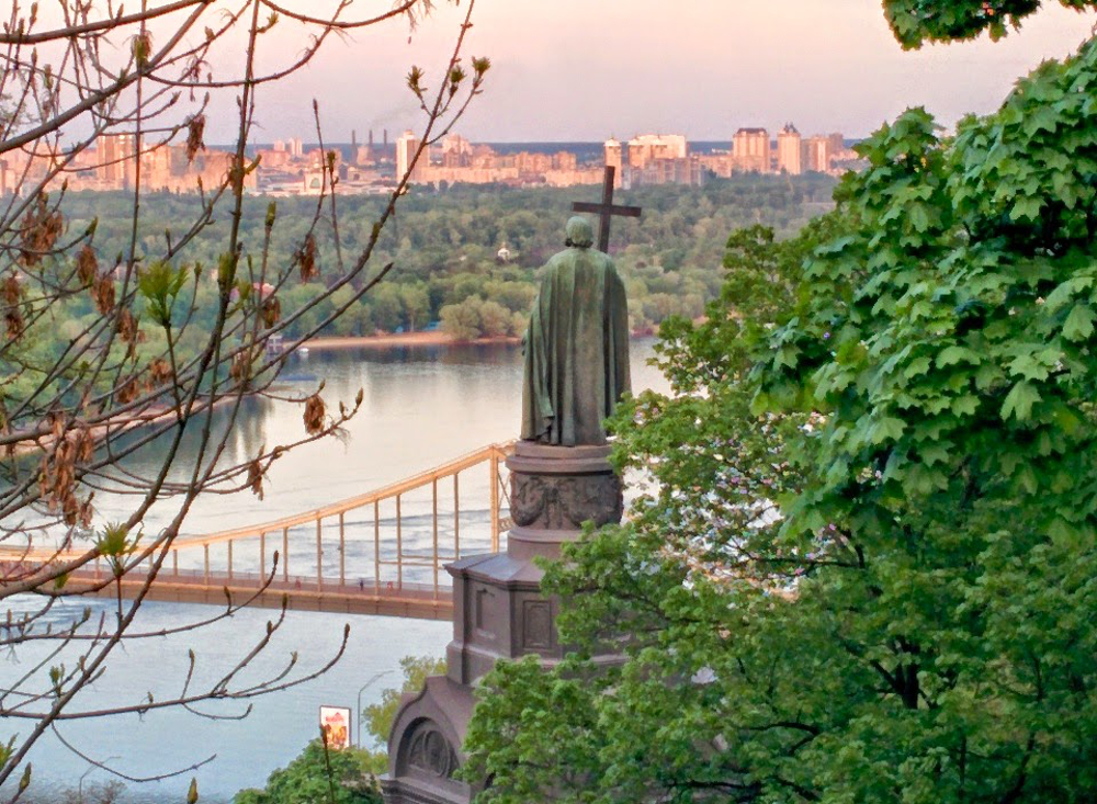 Володимирська гірка, Шевченківський район